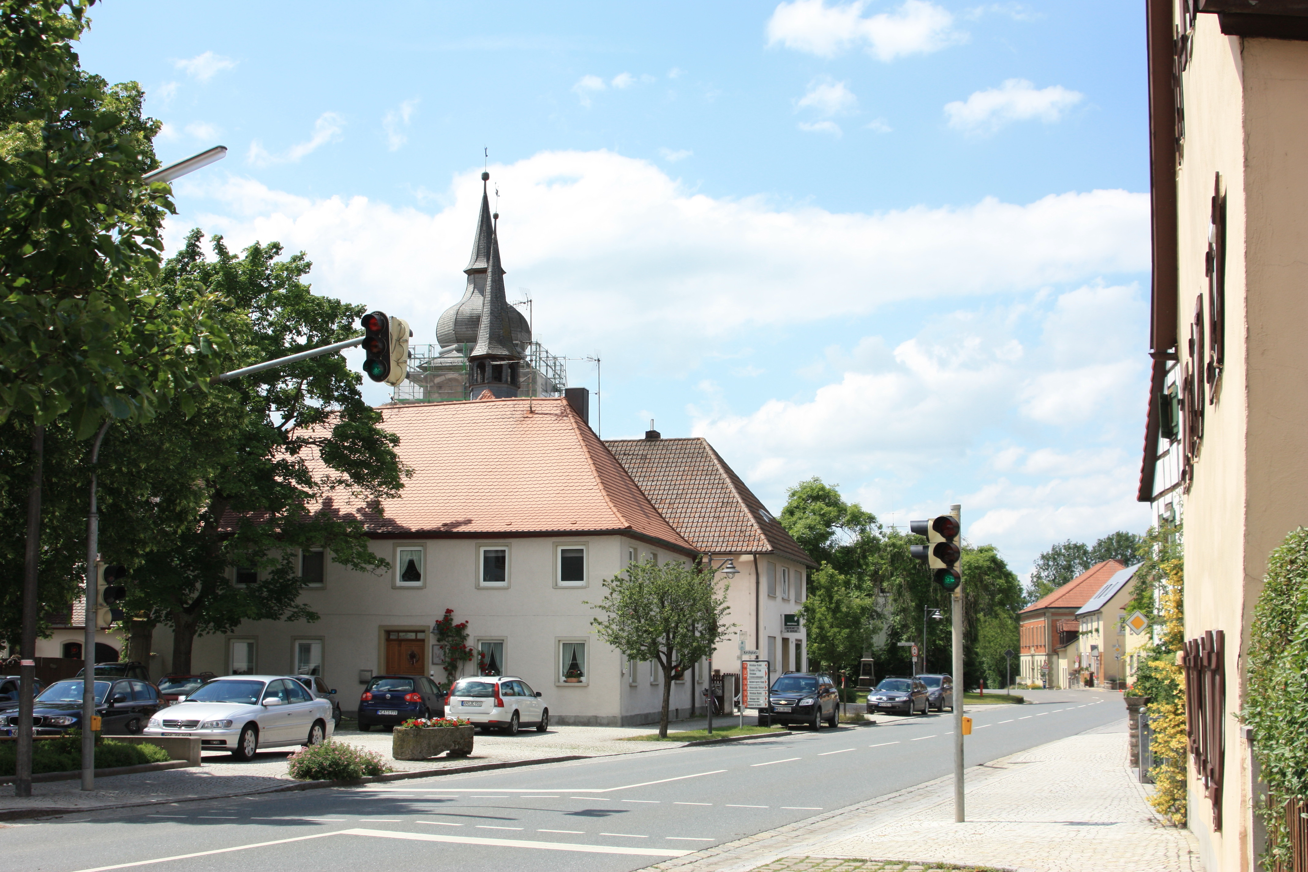 Ortsmitte